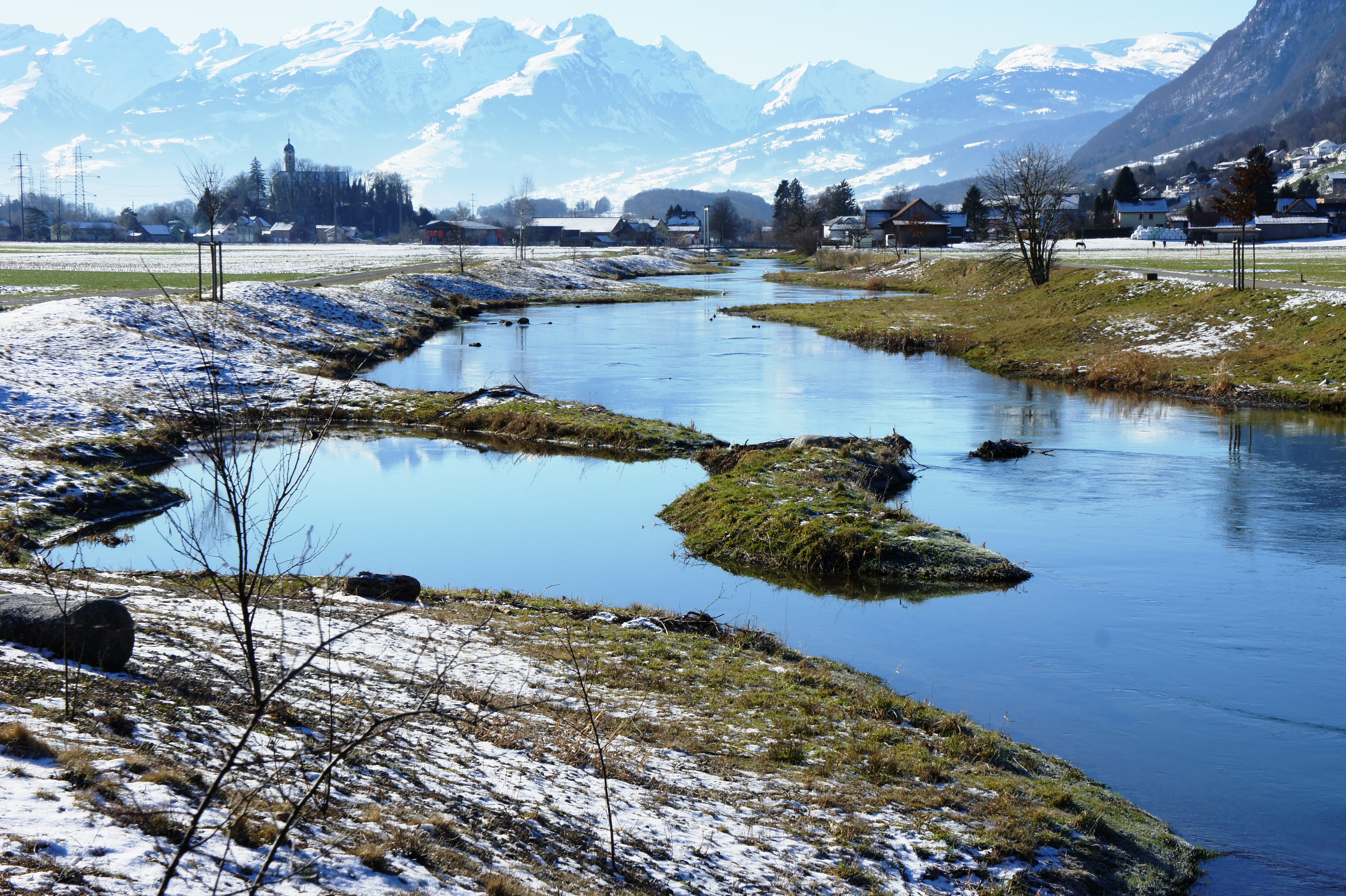 Blick aus Nordosten auf den mittleren Abschnitt des Rheintaler Binnenkanals unterhalb des Dorfes Rüthi. Im Vordergrund der renaturierte Teil des Kanals. In der Bildmitte ist eine Hängebrücke für Fussgänger über den Kanal zu erkennen. Links auf einem kleinen Hügel steht die kath. Pfarrkirche St. Valentin. Im Hintergrund der Alvier, Gamsberg, Gamserrugg und Chäserrugg (von links nach rechts).